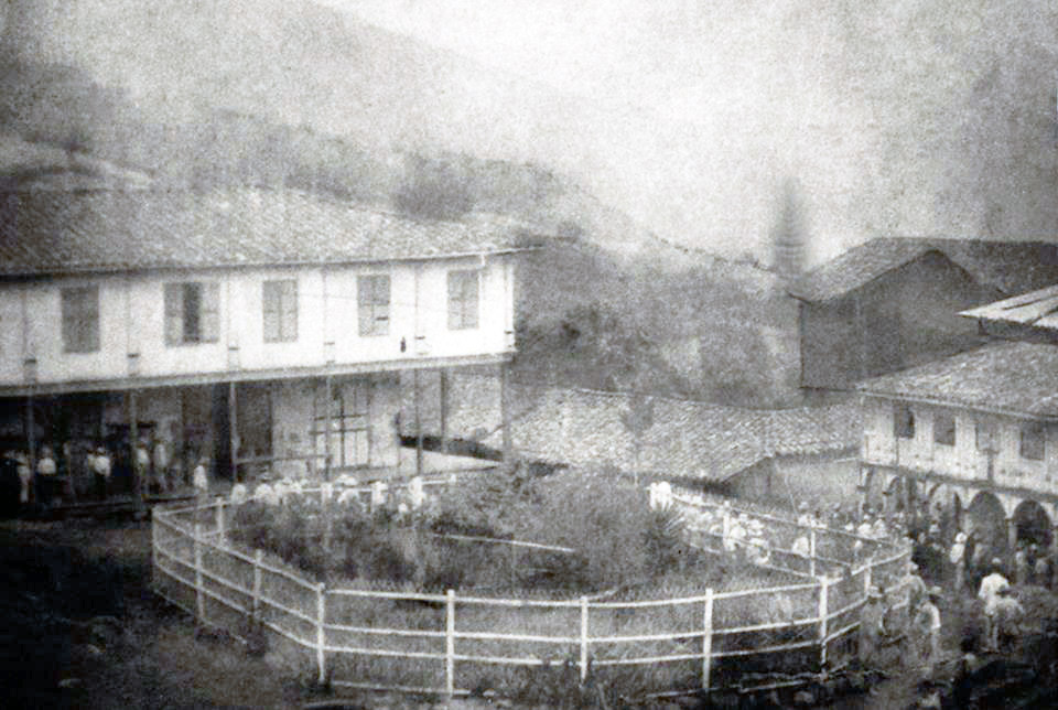 Primer caserío de Piñas